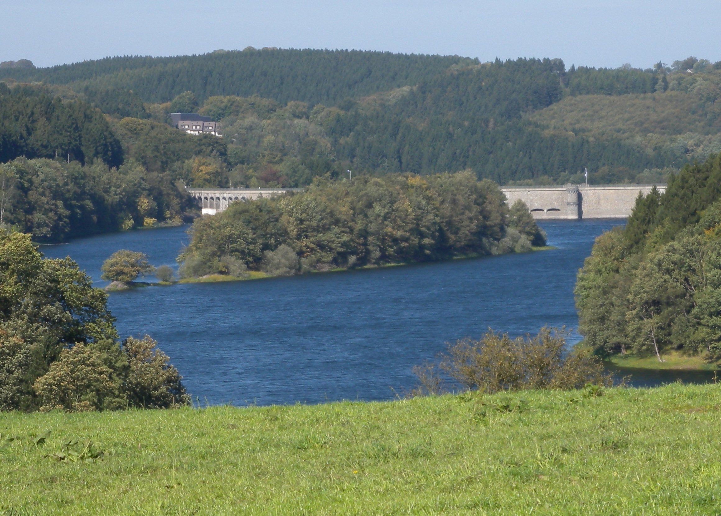 Blick auf die Ennepetalsperre in Breckerfeld